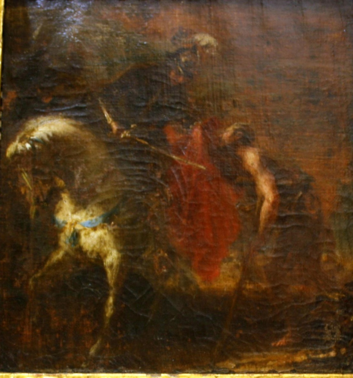 San Martín partiendo la capa con el pobre, óleo sobre lienzo, Madrid, iglesia del Convento de las Carboneras del Corpus Christi, predela de un retablo